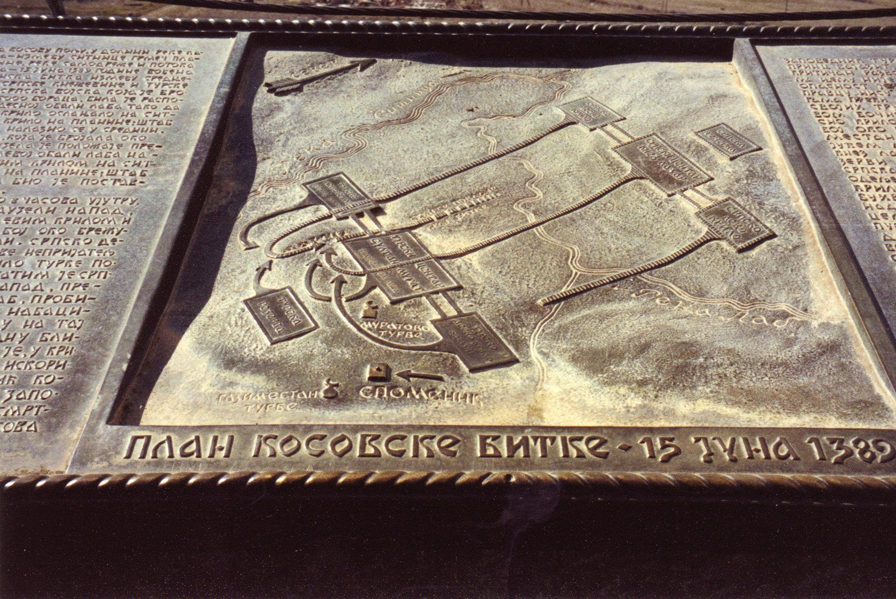 Plan de la Bataille du Champ des Merles